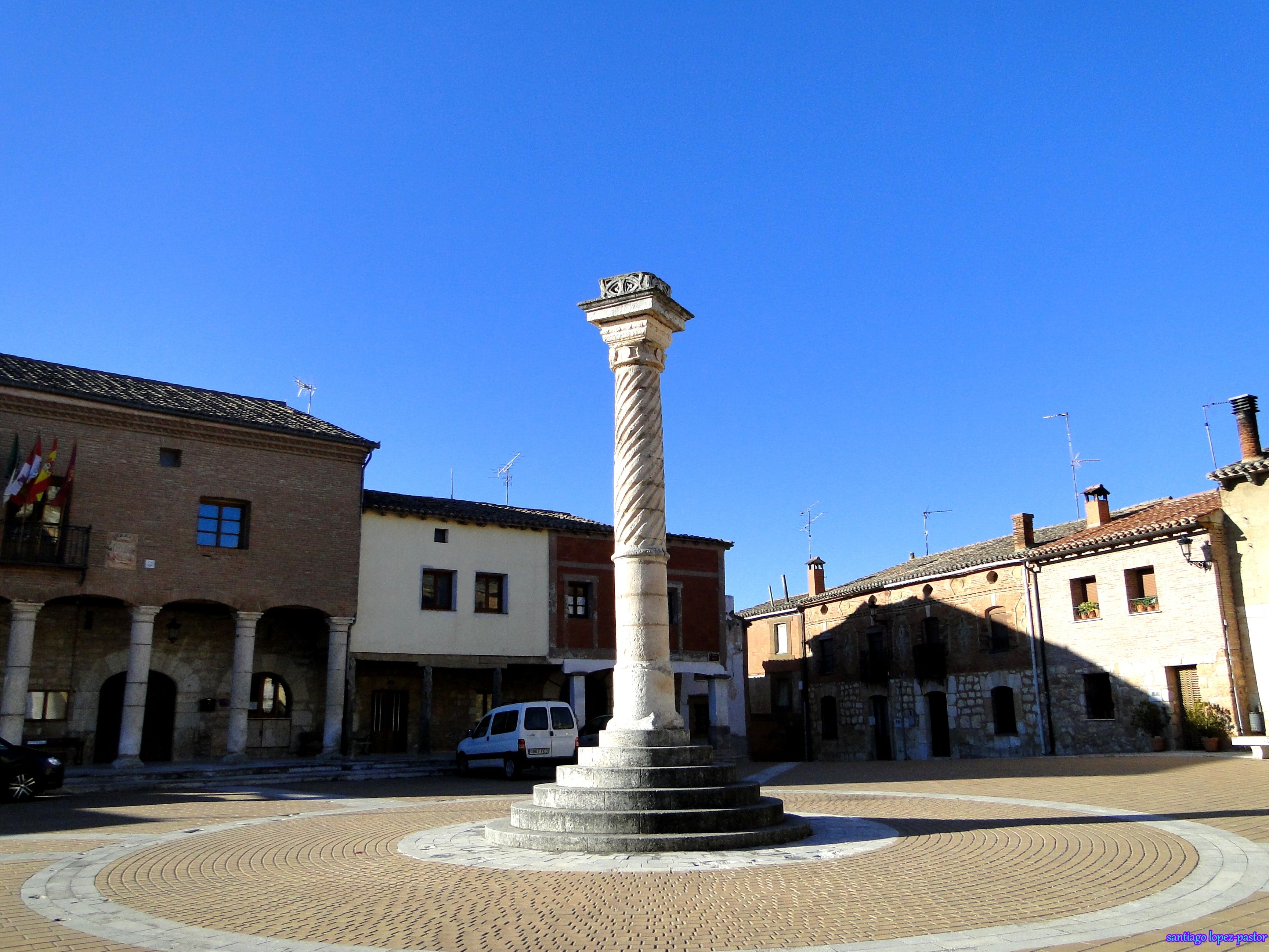 Mahamud